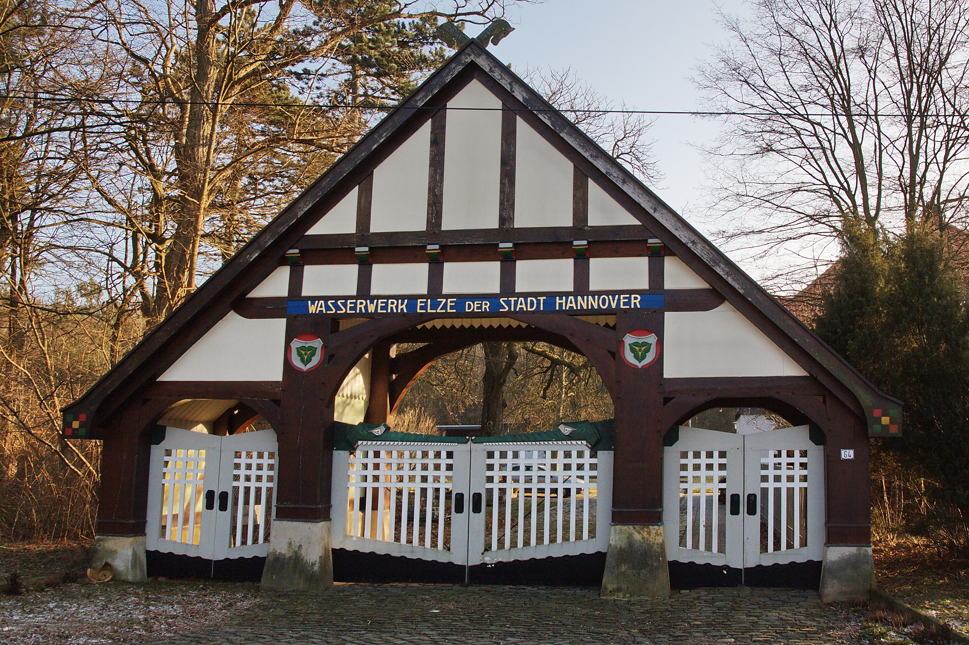 Schmucktor Wasserwerk Elze (Wedemark), Niedersachsen, Deutschland